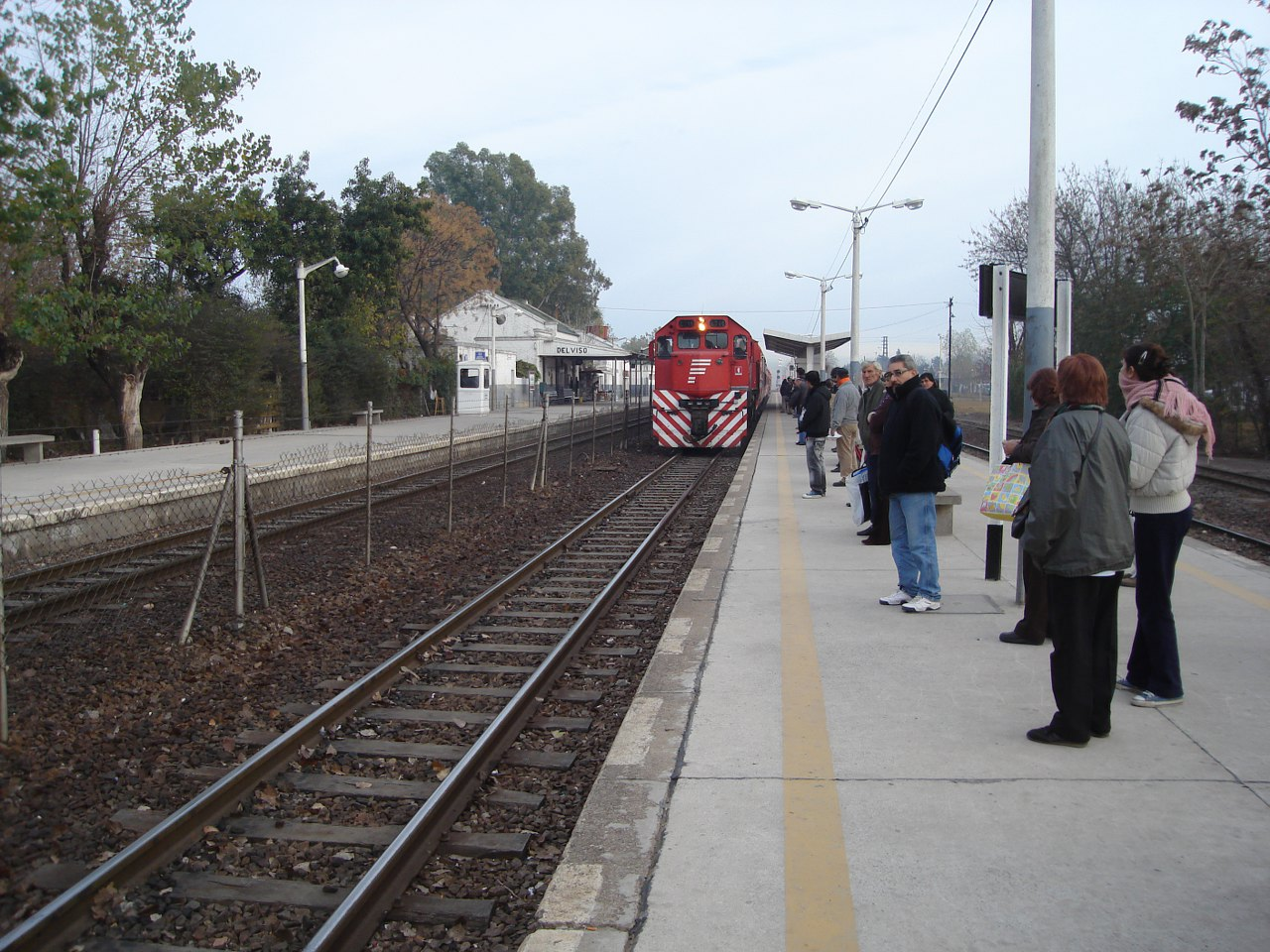 Edificio principal de la estación Del Viso del Ferrocarril General Belgrano vista desde el andén número 2. Del Viso, partido del Pilar, provincia de Buenos Aires, República Argentina.